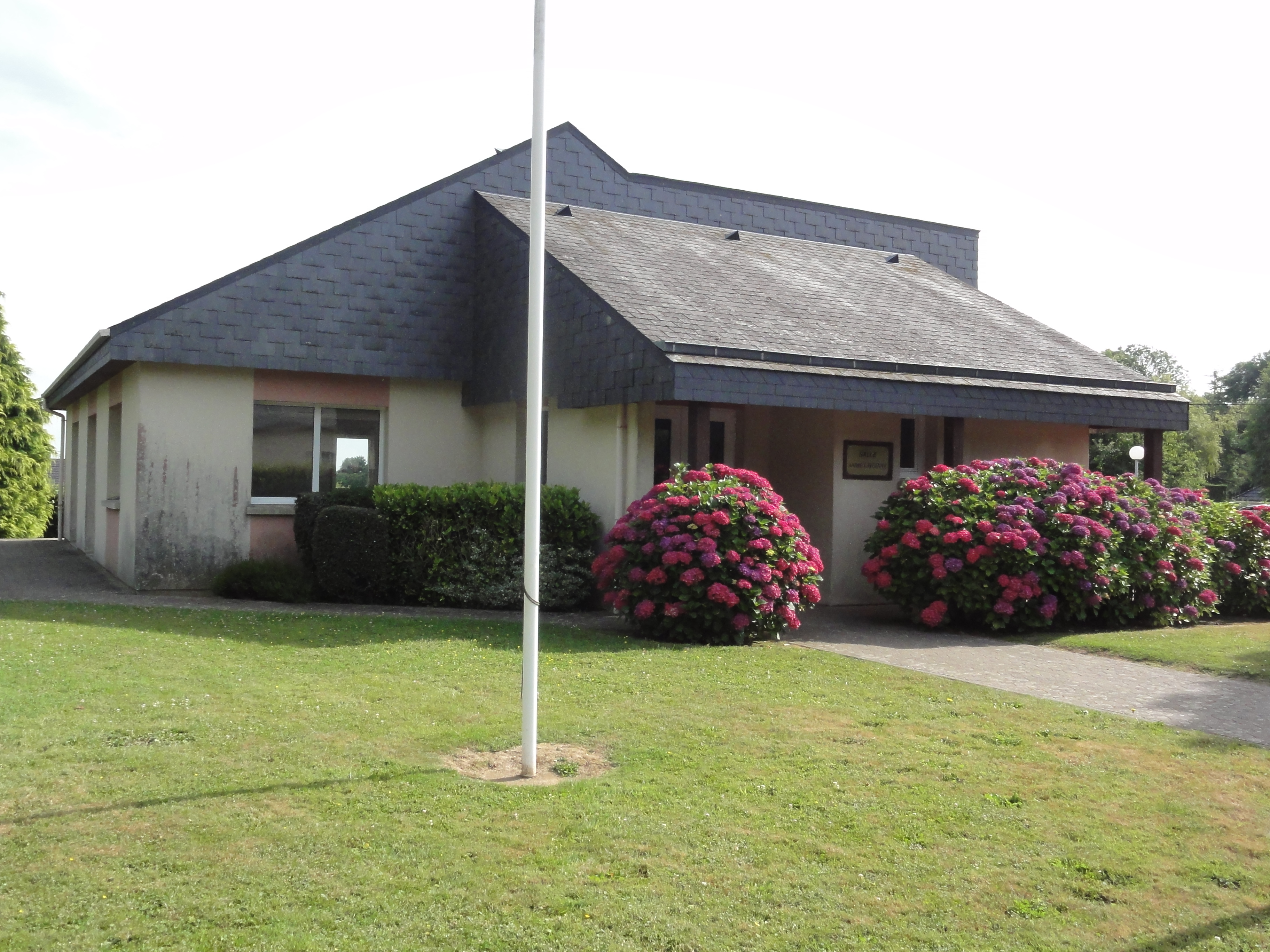 Cleuville (Seine-Mar.) Salle André Lavoinne